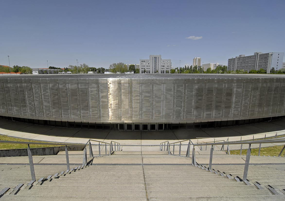 Velodrom Zugang vom Dach, der jedoch selten genutzt wird